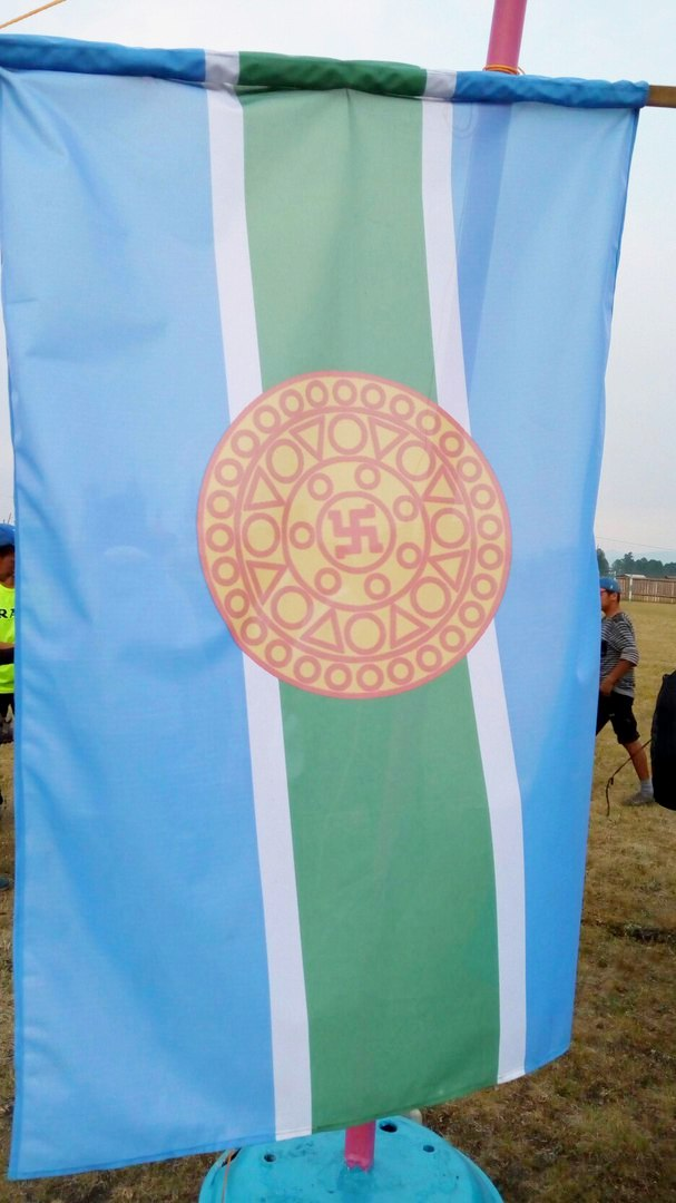 Современный флаг Тере-Хольского района, Тыва. Геральдическое изображение древних монет, найденных при раскопках в Пор-Бажыне